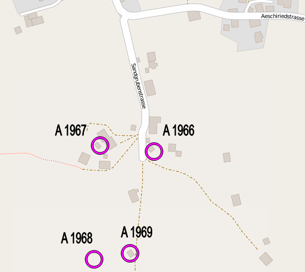 Artilleriebunker Aeschiried BE, Schweiz